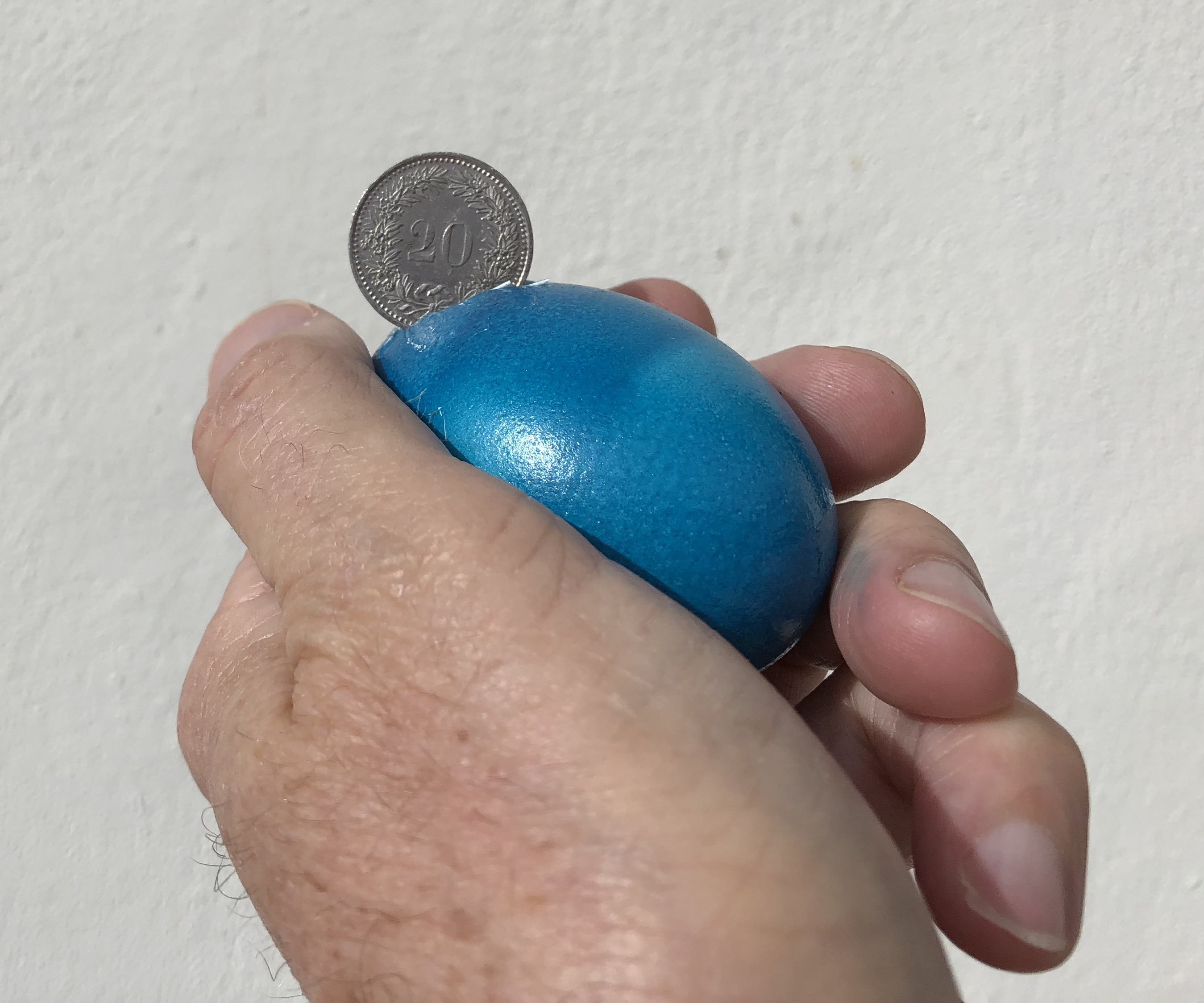 Zwänzgerle